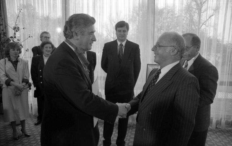 Im Rahmen einer Kabinettsumbildung wurde der CSU-Bundesabgeordnete Horst Seehofer (r.) am 21. April 1989 zum neuen Parlamentarischen Staatssekretär beim Bundesminister für Arbeit und Sozialordnung ernannt. Er wurde Nachfolger des Parlamentarischen Staatssekretärs beim Bundesminister für Arbeit und Sozialordnung, Stefan Höpfinger. Bundesminister Norbert Blüm händigt Parlamentarischem Staatssekretär Stefan Höpfinger das Große Verdienstkreuz mit Stern des Verdienstordens der Bundesrepublik Deutschland aus.